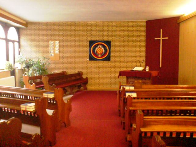 Mennonitengemeinde Ludwigshafen, Rheinland-Pfalz, Deutschland / Germany